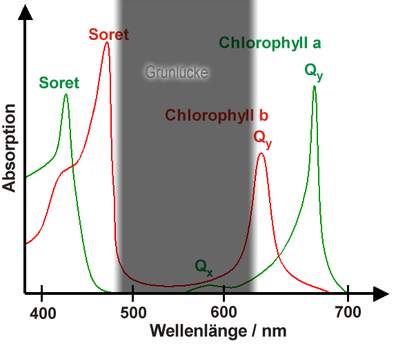 Zeigt den Wellenlängenbereich der Grünlücke